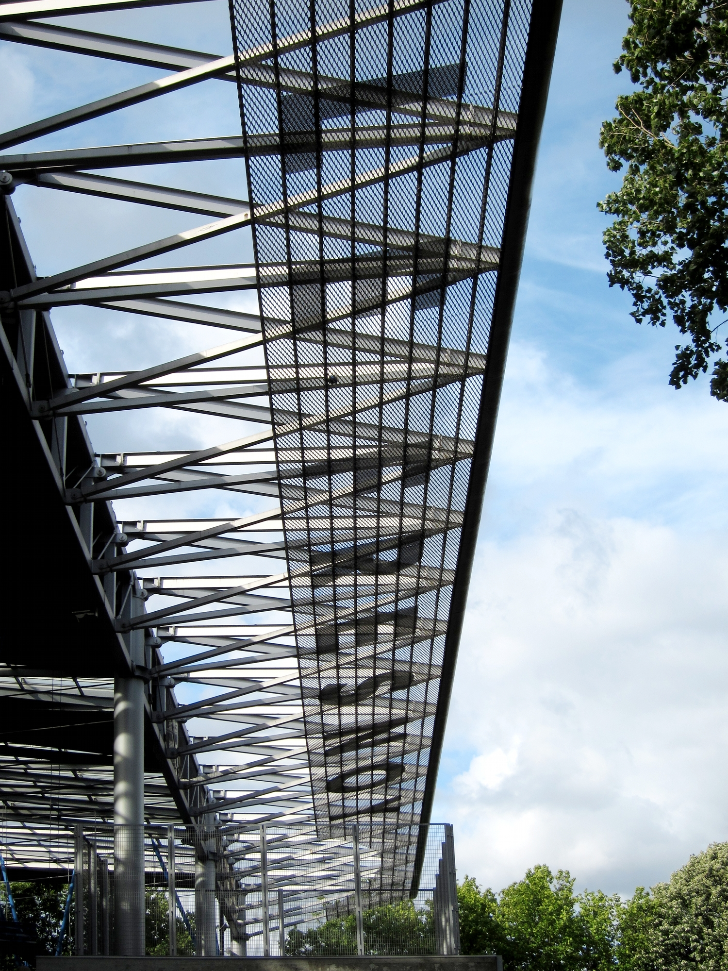 Le auvent de la façade du Fresnoy à Tourcoing (Nord).